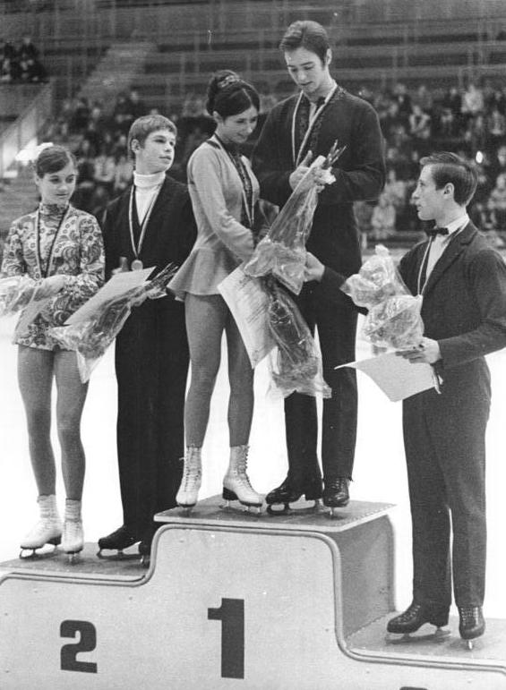 Zentralbild Wendorf-27.11.90 Berlin: Jugendwettkämpfe der Freundschaft im Eiskunstlaufen in der Berliner Dynamo-Eishalle. Siegerehrung im Paarlauf am 26.11.70. vlnr: Sylvia Johne-Detlef Kurzweck (DDR, 2. Platz - Platzziffer 10 und 205,40 Punkte), Marlies Radunsky-Rolf Österreich (DDR, 1. Platz - Platzziffer 9 und 205,90 Punkte) und Wassilij Blagow (UdSSR, 3. Platz - Platzziffer 11 und 203,80 Punkte). Seine Partnerin Irina Tschernjajewa hatte sich beim Kürvortrag leicht verletzt und fehlte bei der Siegerehrung.